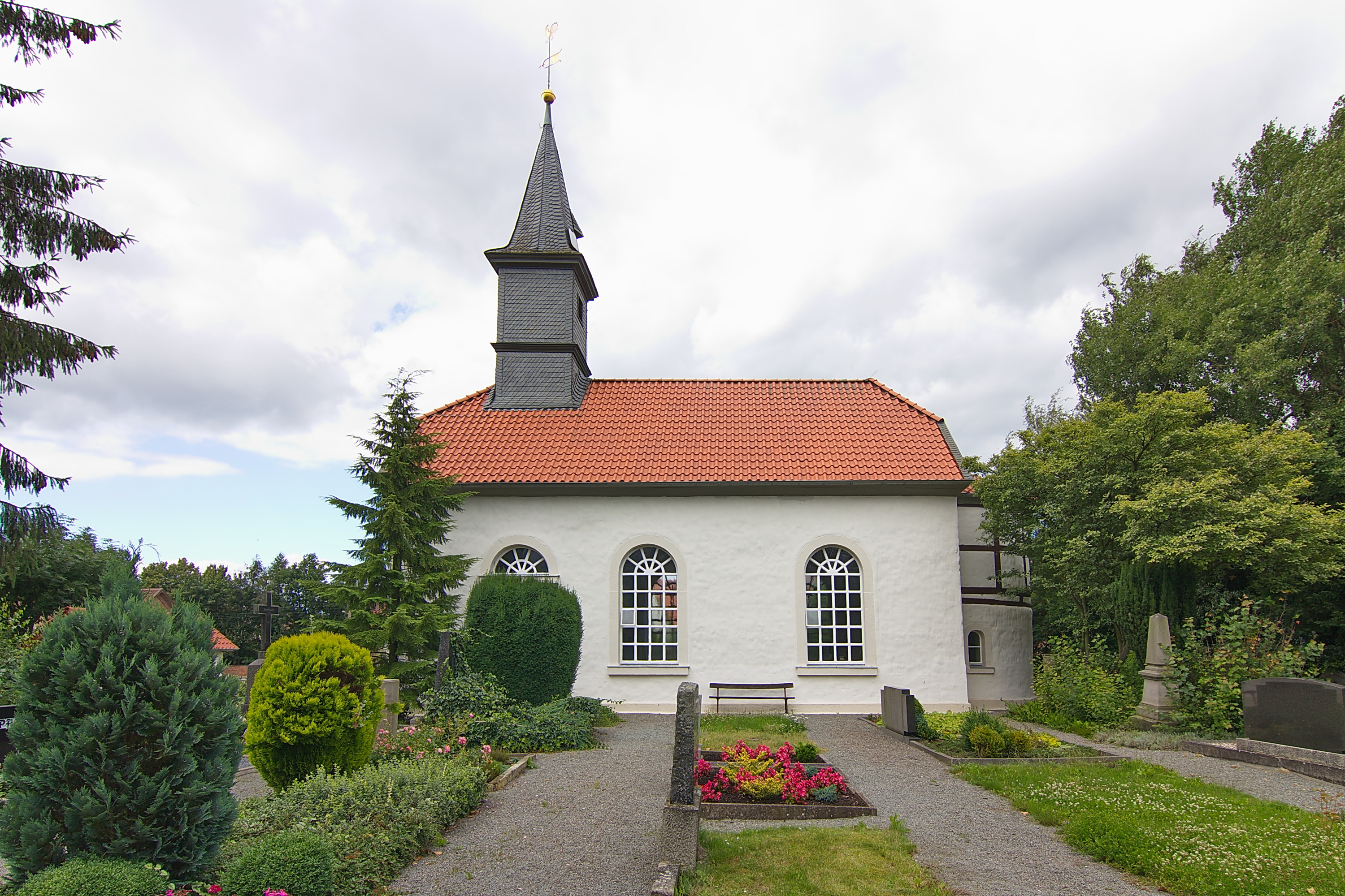 Evangelische Pfarrkirche (13. Jhd.) zu Berkum (Peine), Niedersachsen, Deutschland.